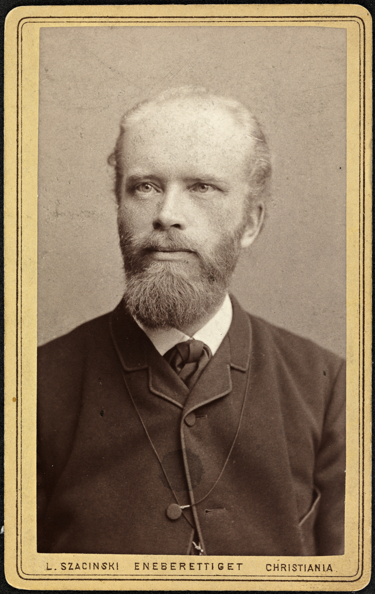 Tittel / Title: Portrett av Viggo Ullmann (1848-1910) Motiv / Motif: Visittkort. Viggo Ullmann var skolemann og politiker (V). Som bror av kvinnesaksforkjemperen og skolebestyrerinnen Ragna Nielsen (1845-1924) støttet han kvinnesaken fra ca. 1890 og gikk inn for kvinnelig stemmerett. Sted / Place: Oslo Bildesignatur / Image Number: blds_05659